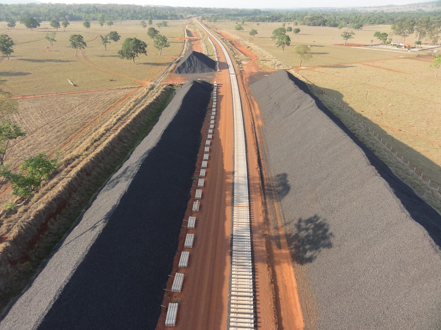 FIOL Lote 05 - Pavotec S/A